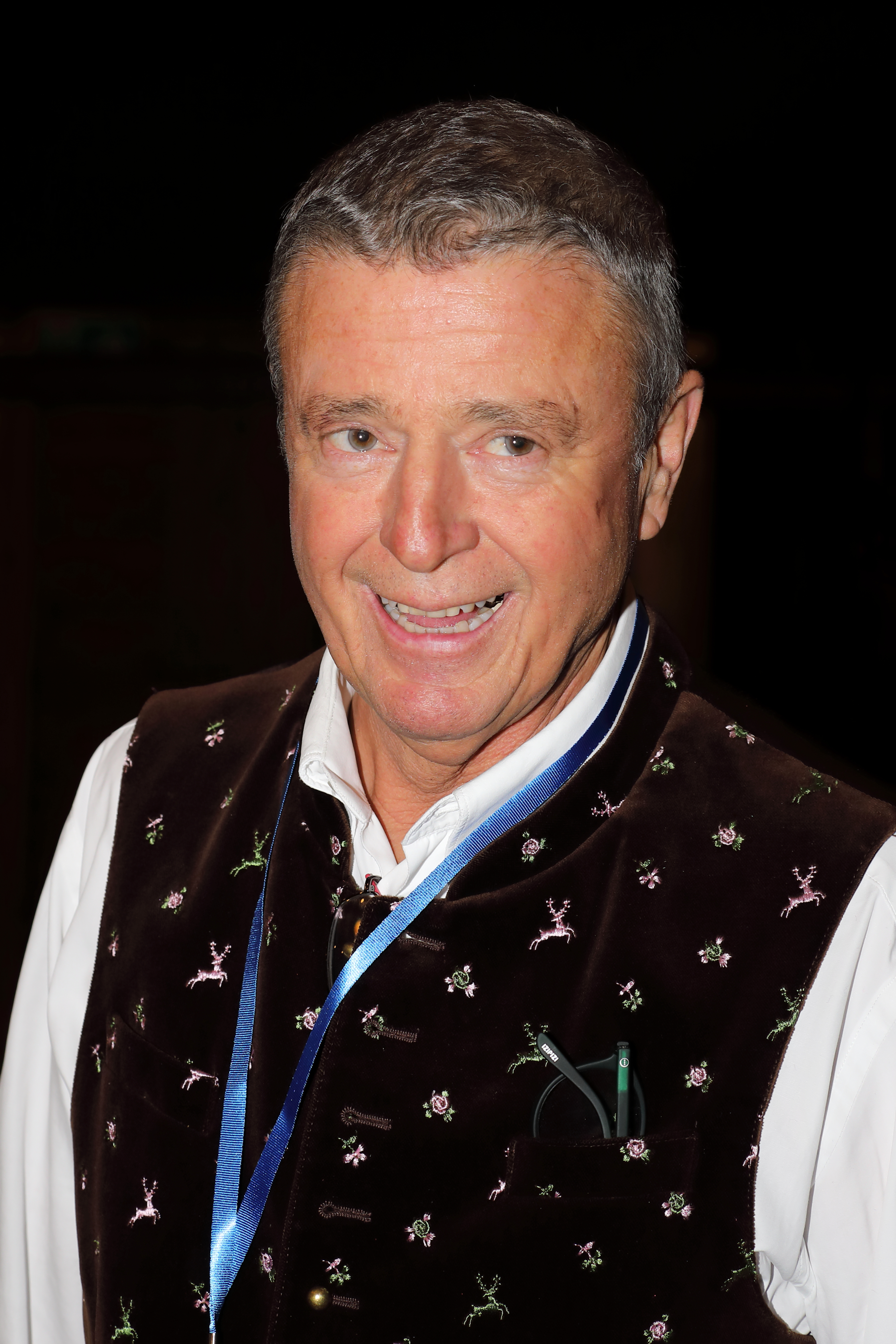 Der österreichische DAÖ-Pressemanager und Ex-FPÖ-Politiker Gernot Rumpold beim DAÖ-Aschermittwochtreffen 2020 in der Prateralm im Prater im 2. Wiener Gemeindebezirk Leopoldstadt.